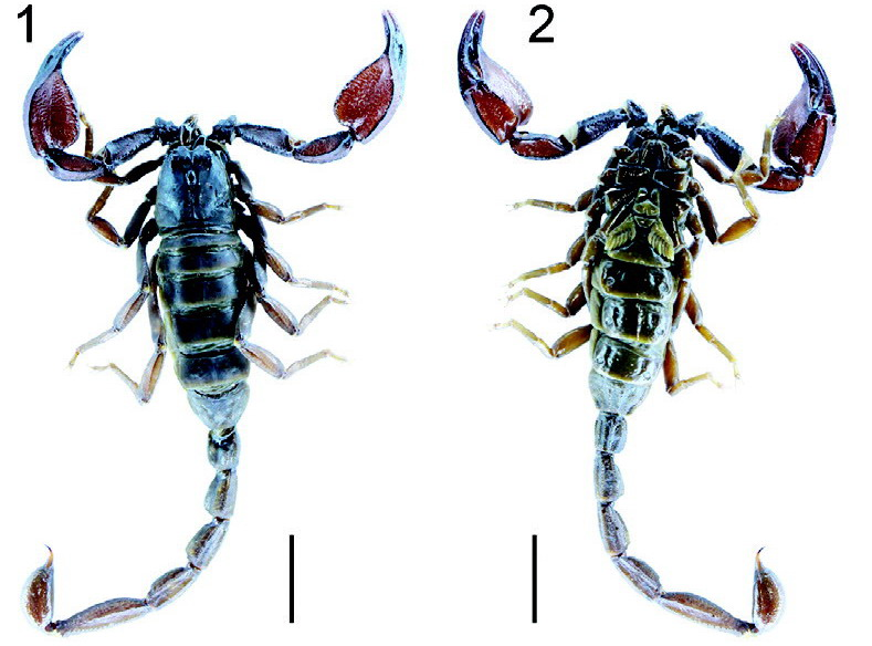 Scorpiops ingens male